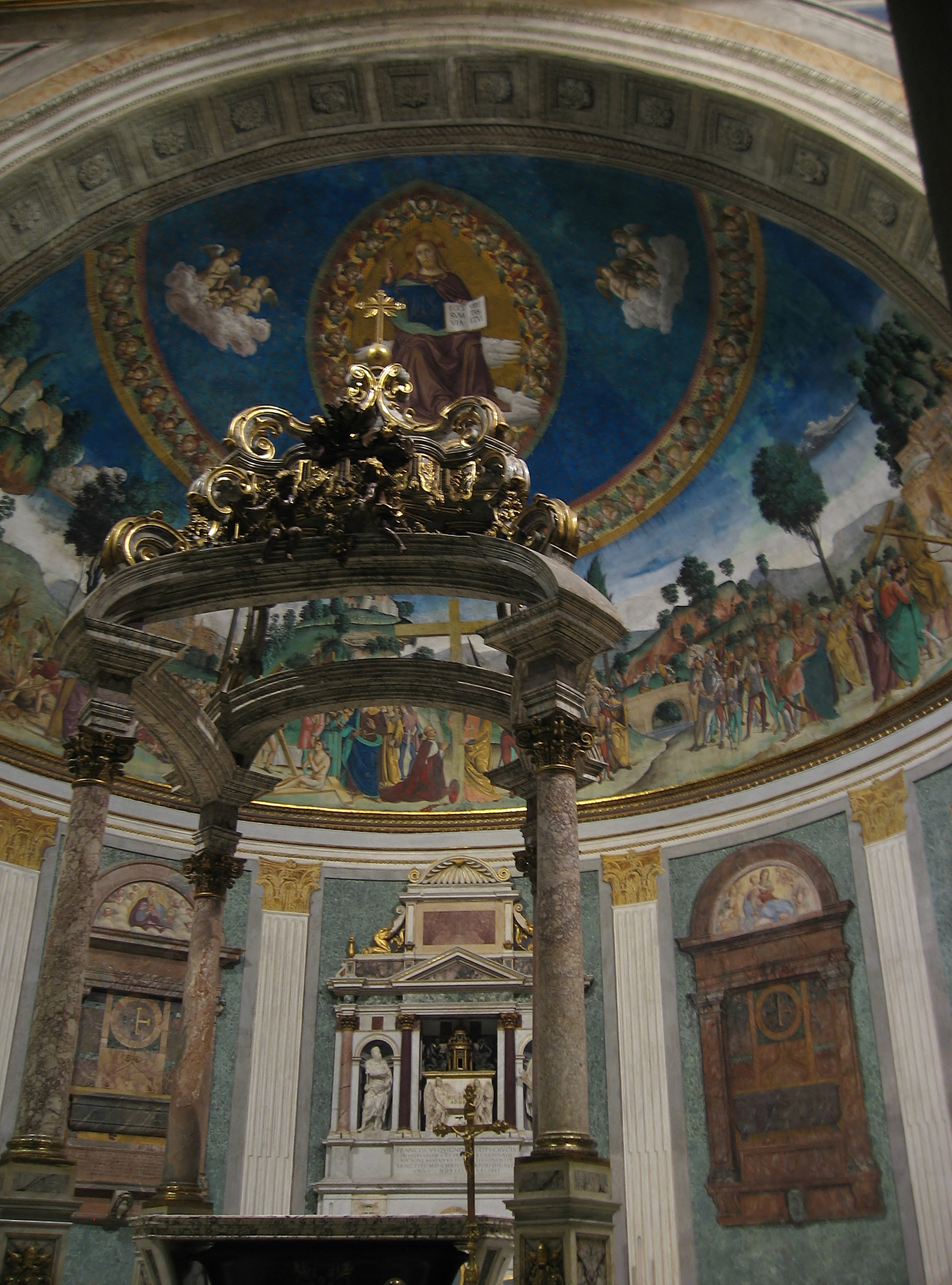 Kirche Santa Croce in Gerusalemme in Rom/Italien, Apsis mit Fresko "Finden des Wahren Kreuzes"